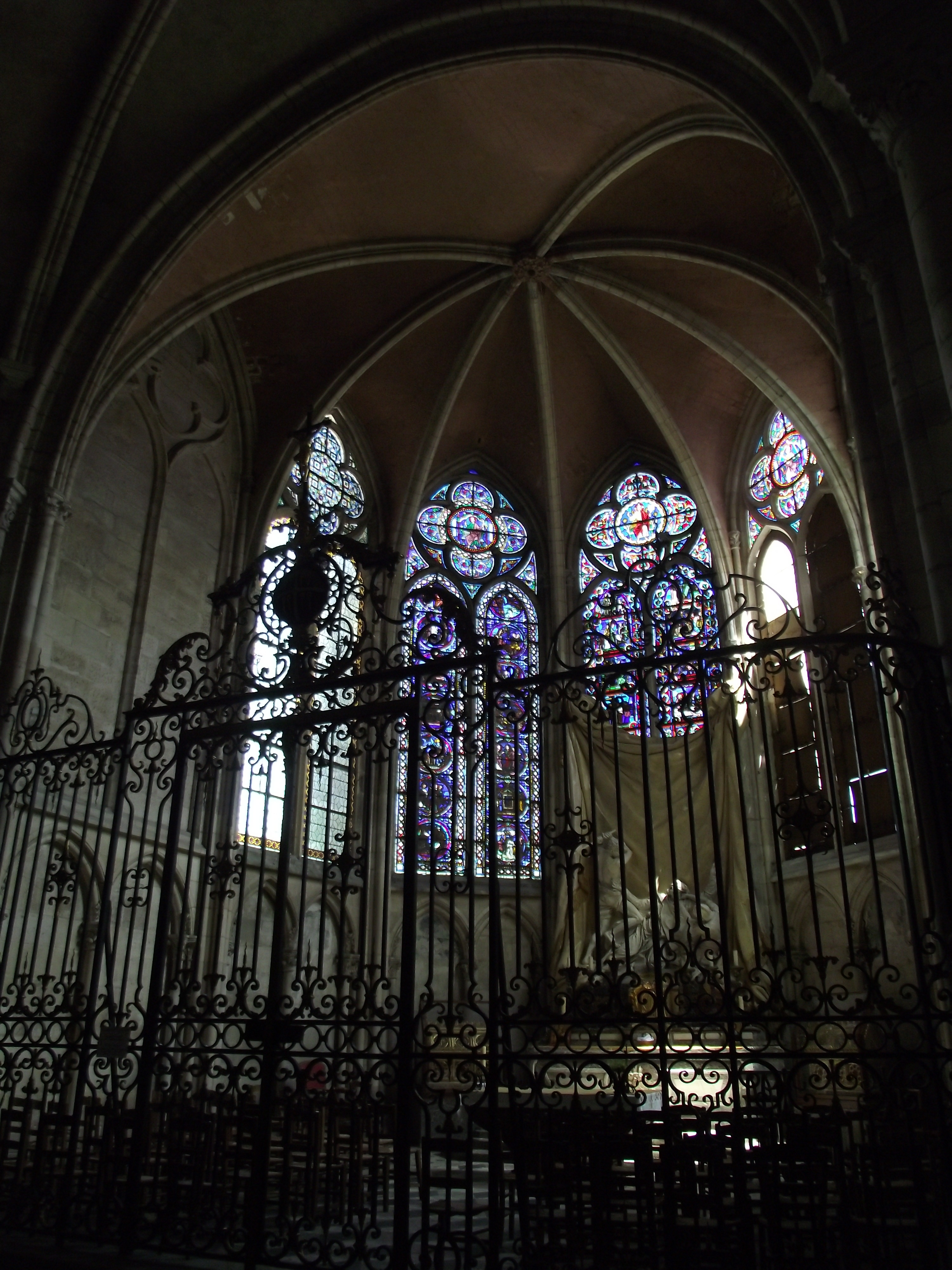 Sens, Cattedrale di Santo Stefano